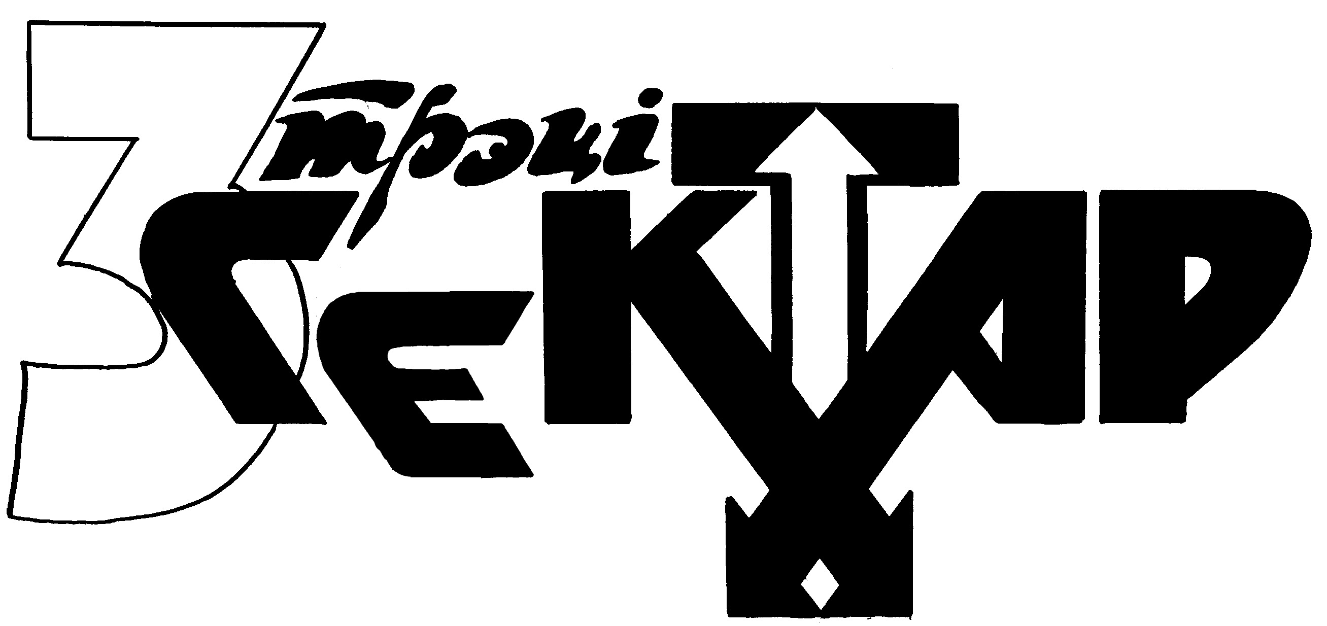 Беларуская (тарашкевіца): Лагатып грамадскага аб'яднання "Цэнтр "Трэці сектар"